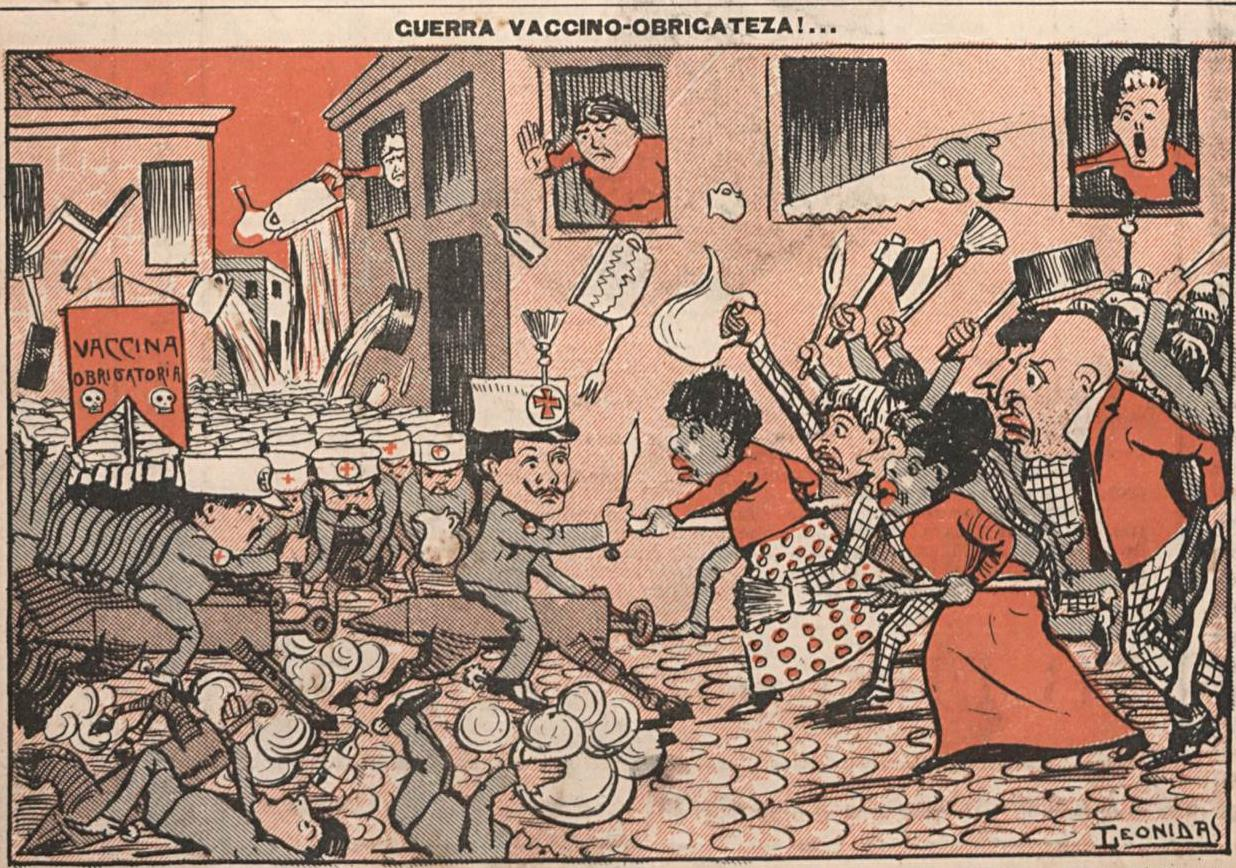 Legenda: "Espetaculo para breve nas ruas desta cidade: Oswaldo Cruz, o Napoleão da seringa e lanceta, à frente de suas forças obrigatorias, será recebido e manifestado com denodo pela população. O interessante dos combates deixará a perder de vista o das batalhas de flores e da guerra russo-japoneza. E veremos no fim da festa quem será o vaccinador, á força!".